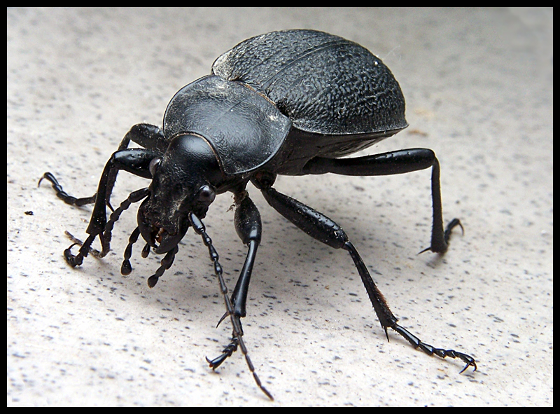 Carabus coriaceus female